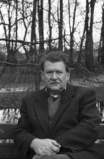 Georg P. Salzmann (1929 bis 2013) am 28.12.1993 auf einer Bank im Paul-Diehl-Park in Gräfelfing. Die Fotografie gehört zu einer Reportage mit dem Titel "Salzmanns Archiv", erschienen in: Civilcourage-Forum Heft 2/1994, Juni/Juli S. 32- 35. Die Fotografie ist dort auf Seite 32 veröffentlicht